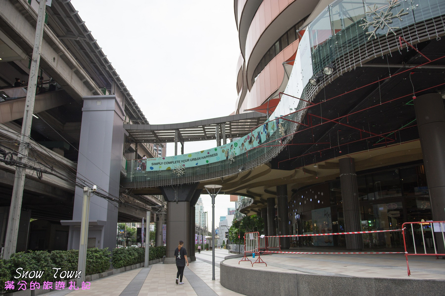 2017-01-09泰國-snow town